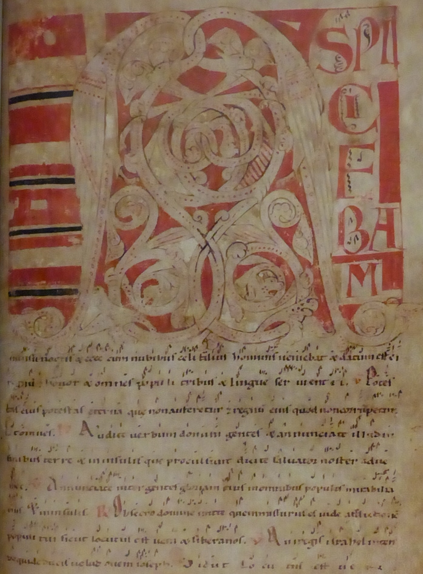 Bibliothèque municipale de Lyon - Ms 537 - Antiphonaire à l'usage du rite lyonnais, XIIe siècle. Premier répons des matines du premier dimanche de l'Avent. Lettre ornée A “Aspiciebam” et notation musicale (folio 109).